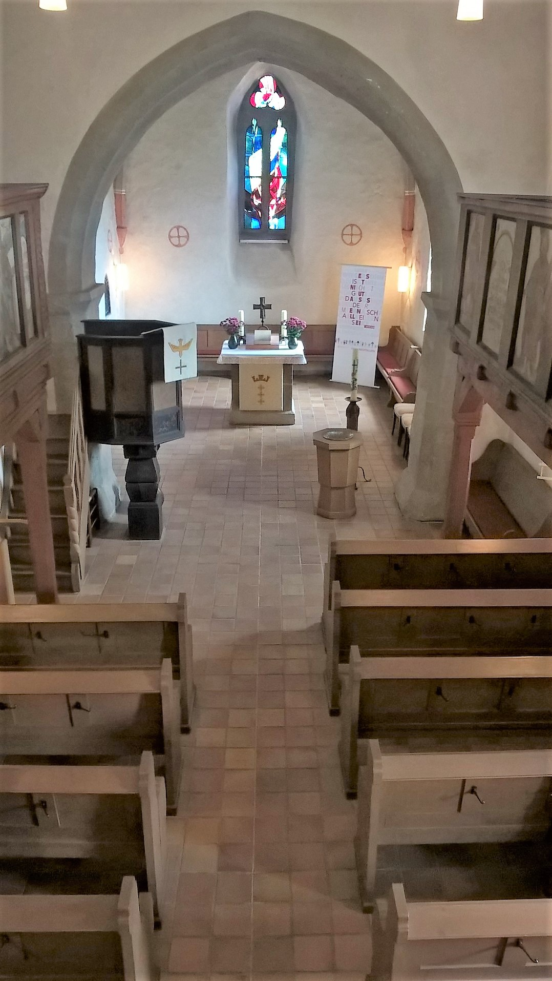 Evangelische Kirche Odenhausen/Lumda, Rabenau, Landkreis Gießen, Hessen, Deutschland